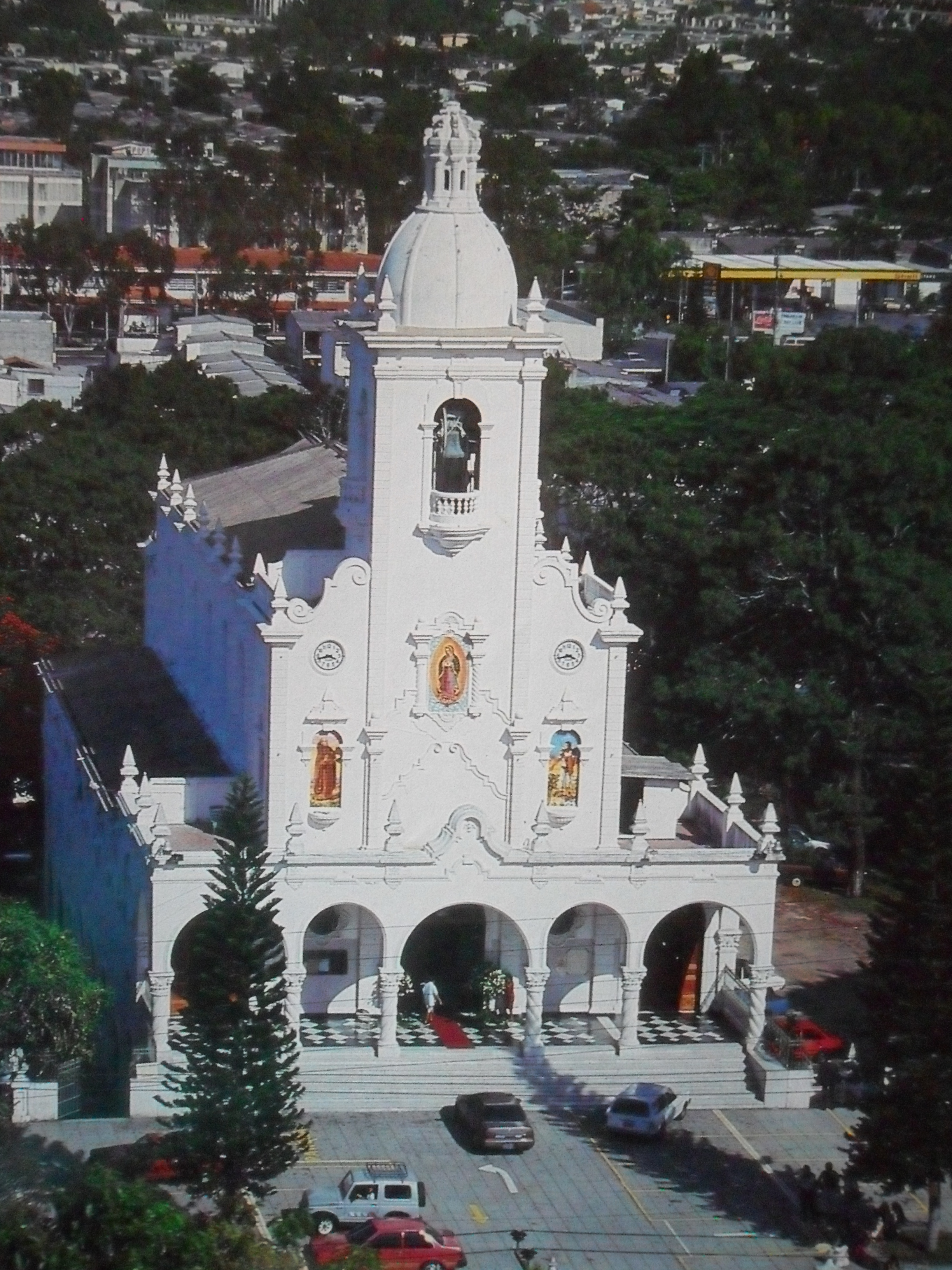 Vasilica de Guadalupe en San Salvador, El Salvador, CA